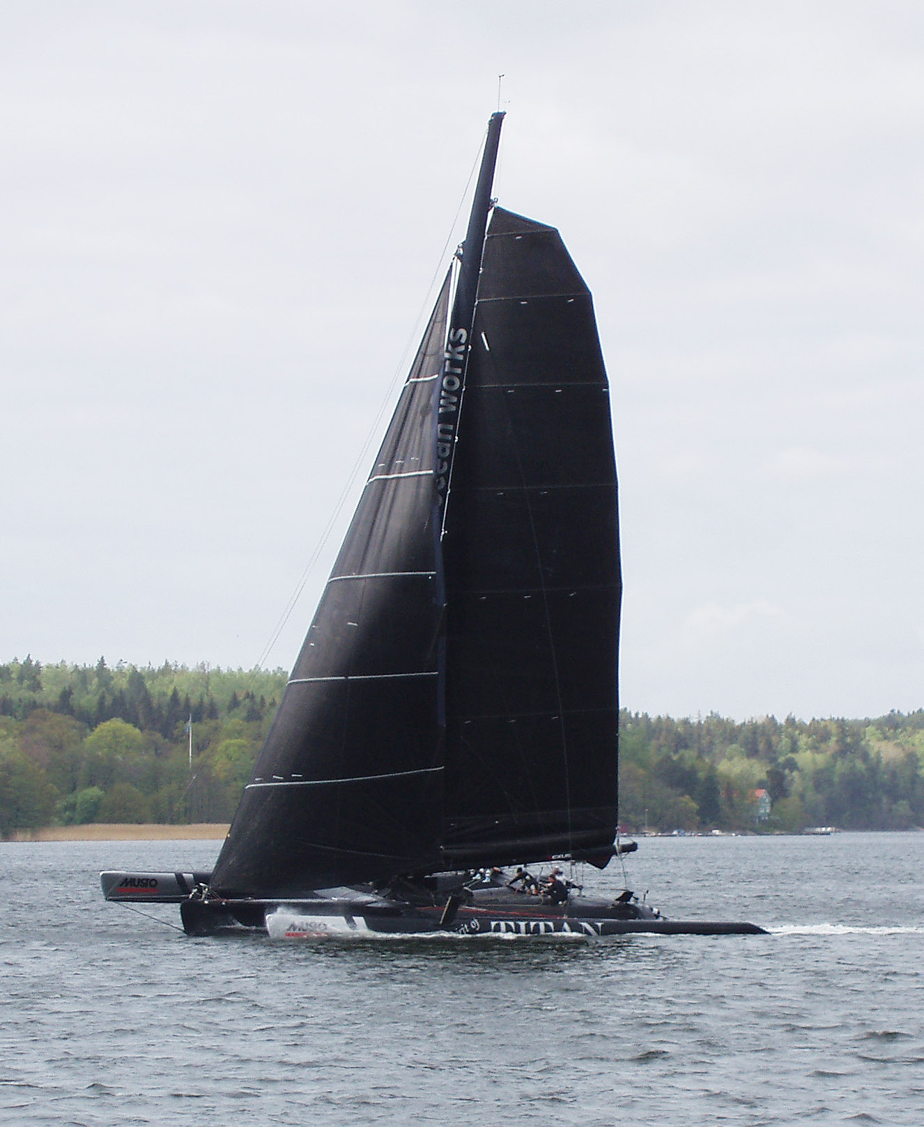 Trimaranen "Spirit of Titan" av typen ORMA 60 byggd helt i kolfiber med beslag av titan. Bild från målgång utanför Torsviks fyr i kappseglingen Lidingö Runt 8 maj 2009. Båten avverkade distansen cirka 13.5 distansminuter på cirka 1 timme och 28 minuter med i huvudsak västliga vindar på cirka 8-10 m/sek.